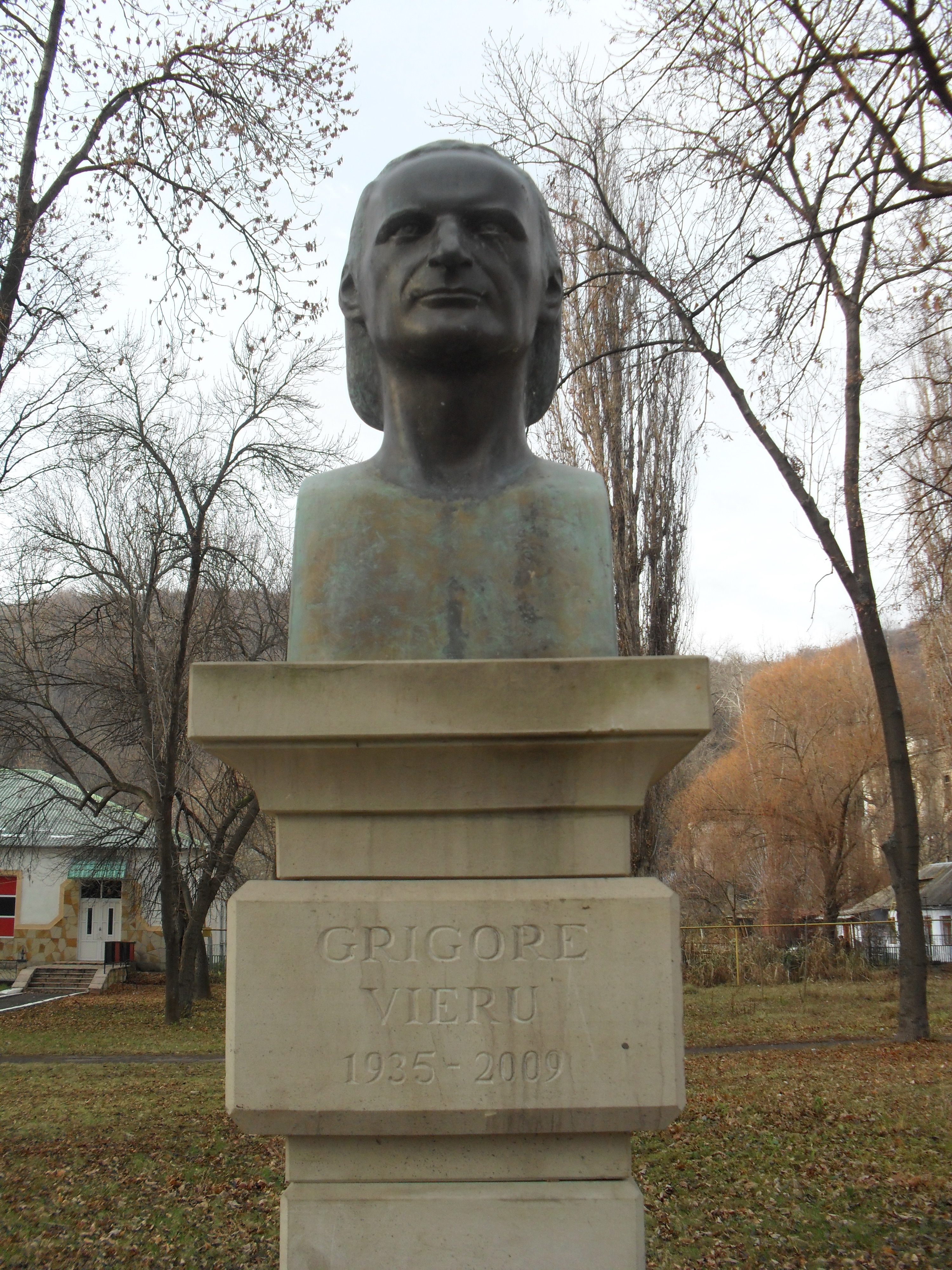 Монумент Григорію Вієру в парку м. Сороки